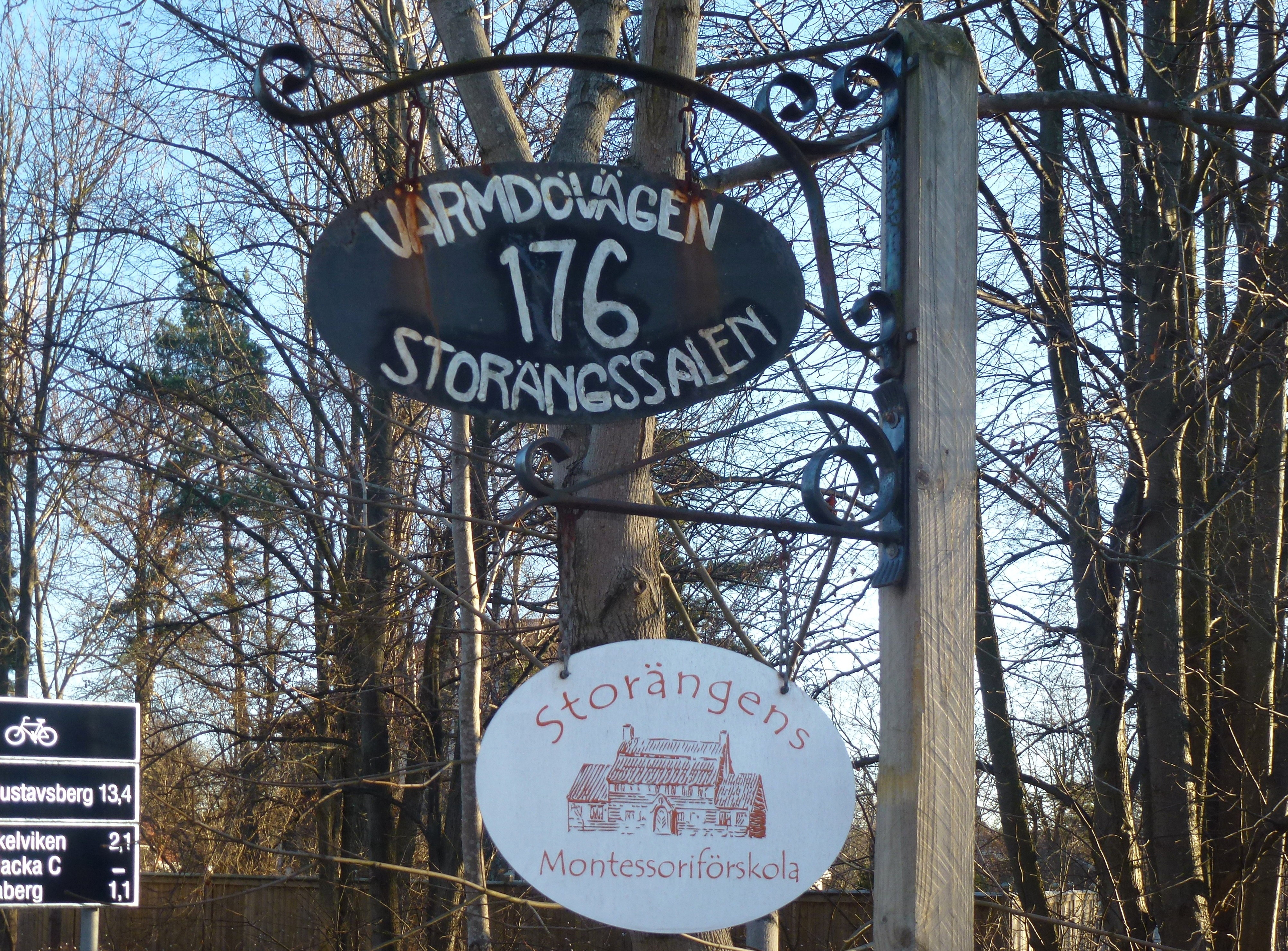 Storängens samskola, skylt vid Värmdövägen